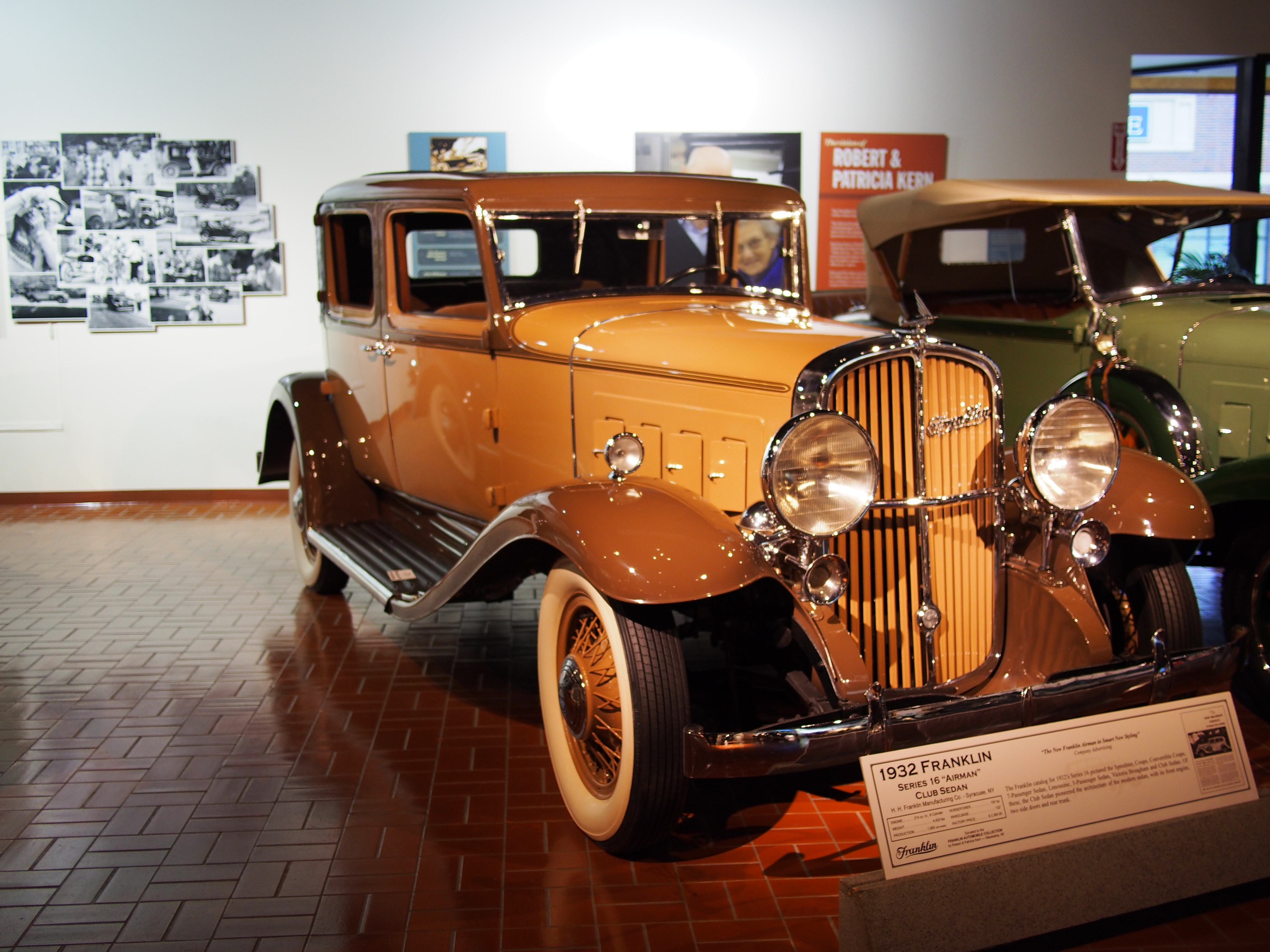 1932 Franklin Series 16 Airman Club Sedan